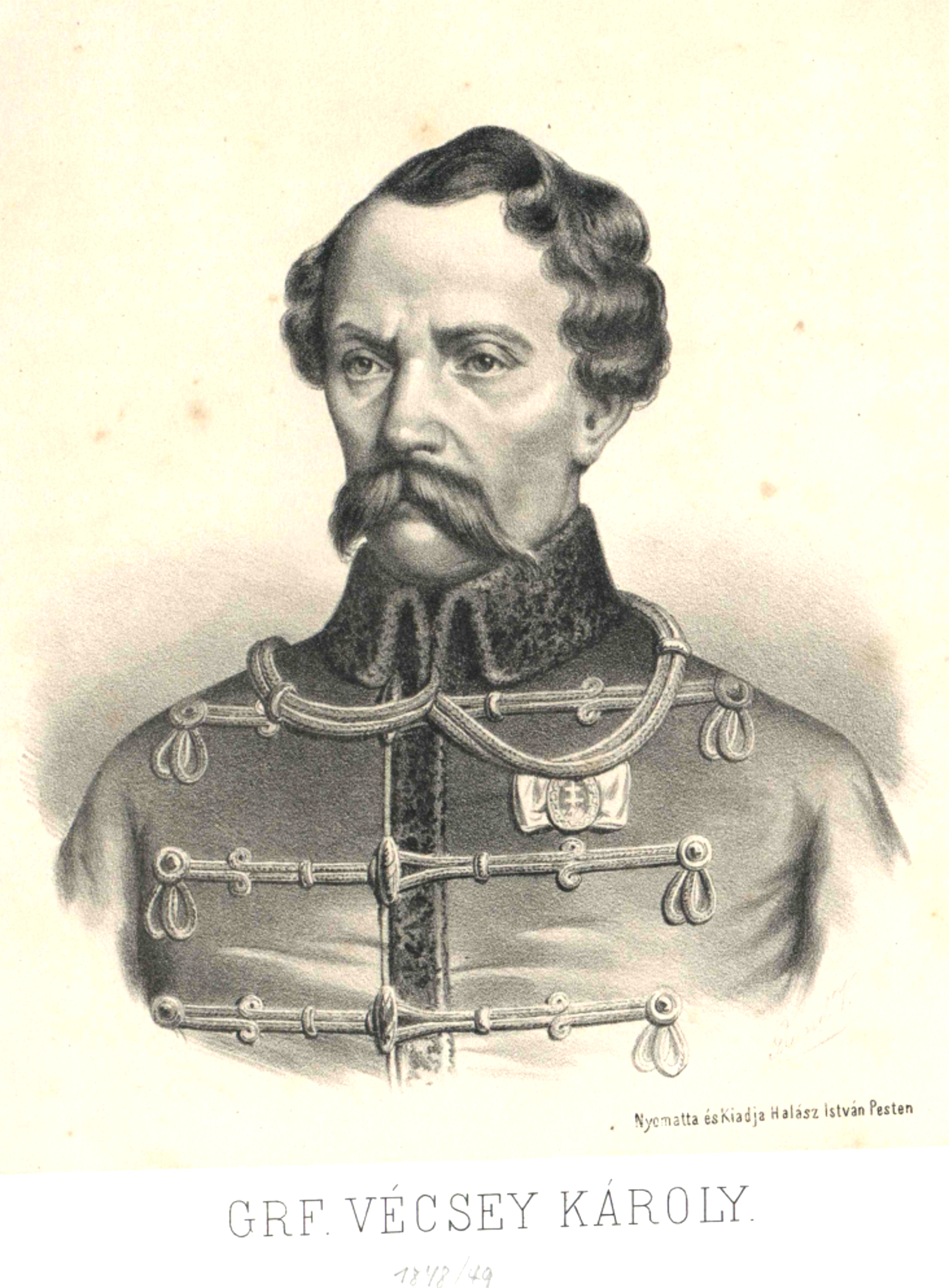 Vécsey Károly (1803–1849) honvéd vezérőrnagy portréja. Szamossy Elek litográfiája